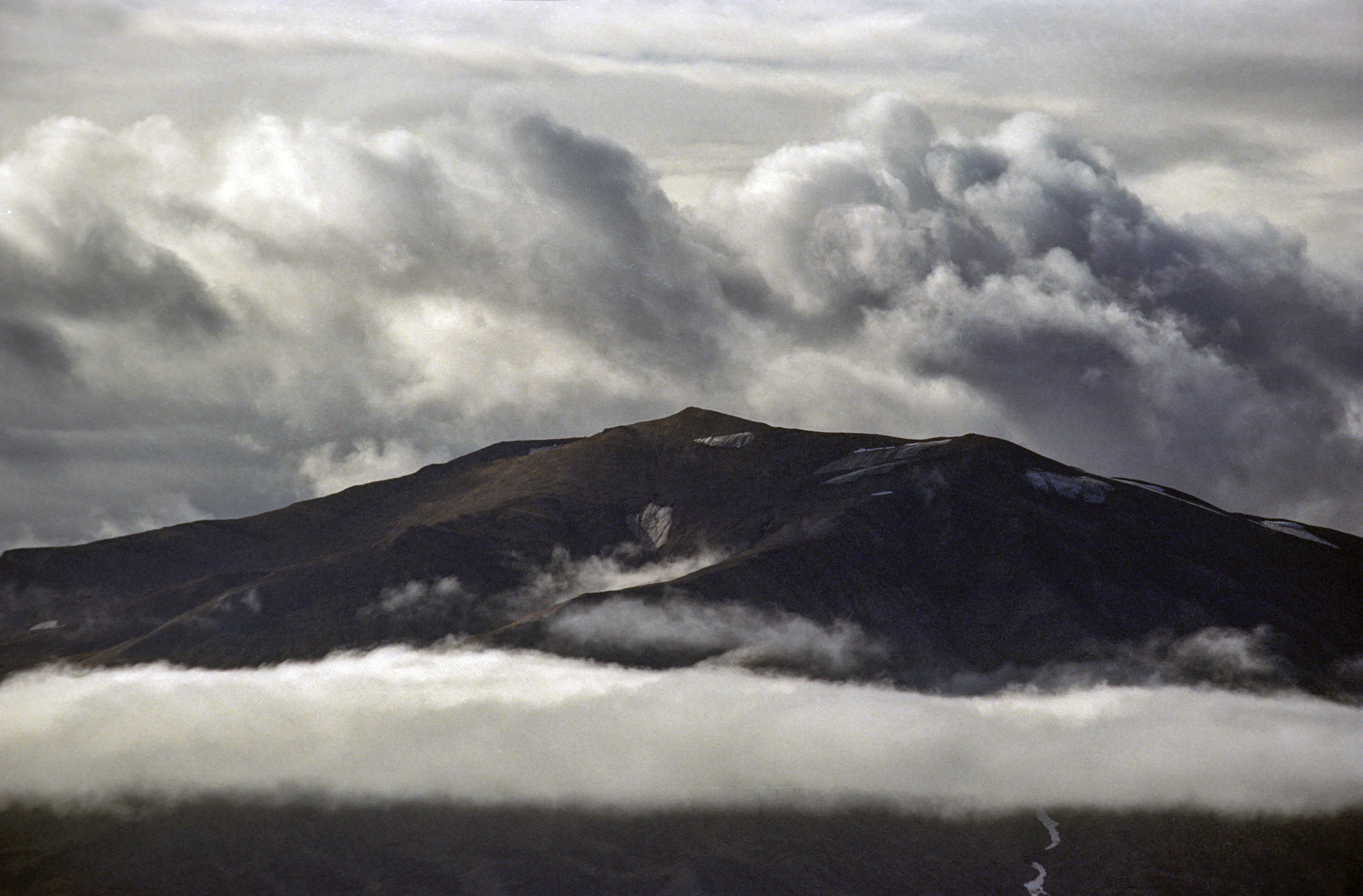 Górzyste krajobraz Andrees Land